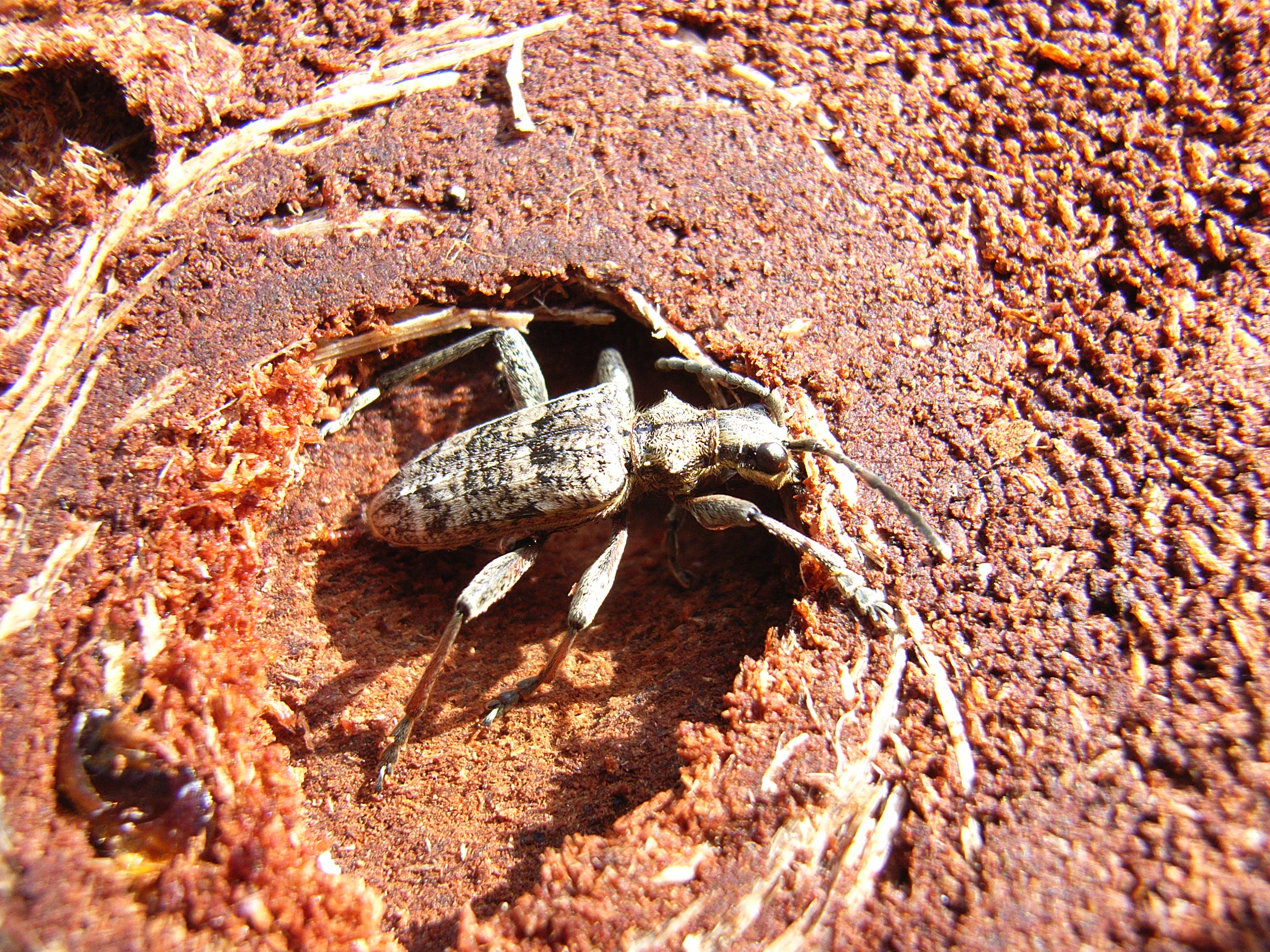 male of Rhagium inquisitor, Puppenwiege in hier abgelöster Rinde von Picea abies links die chitinisierten Kiefer des letzten Larvenstadiums